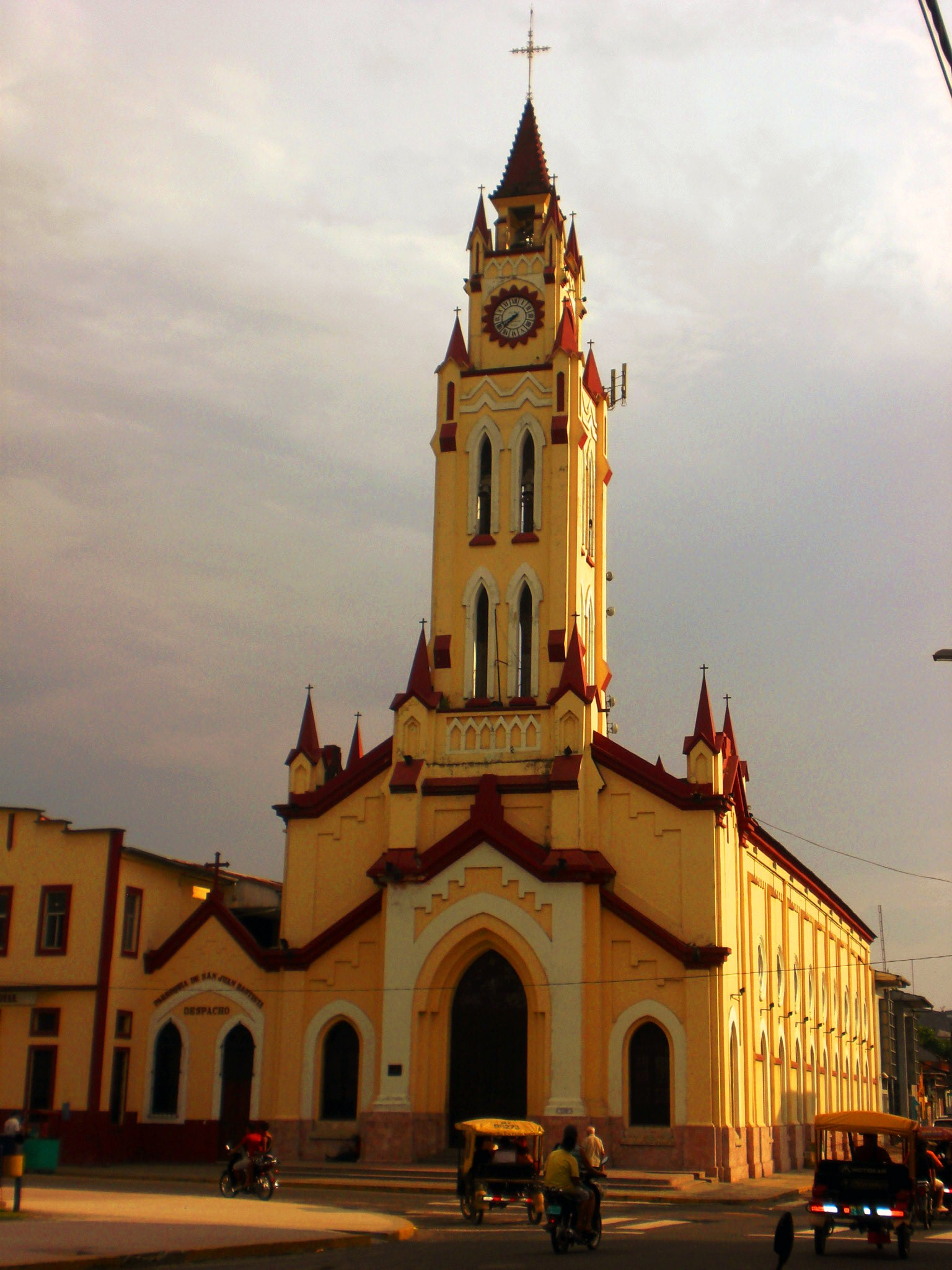 Iglesia Matriz de Iquitos